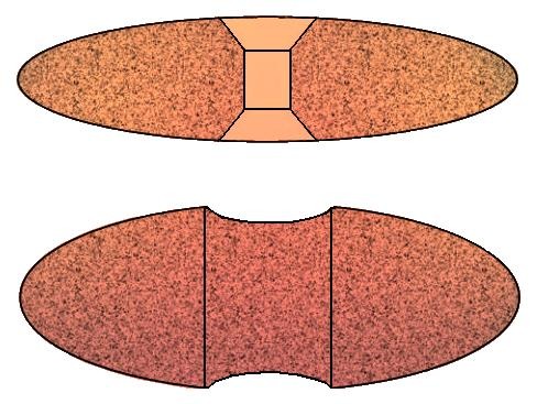 Geröllkeule, Steinkopfkeule.